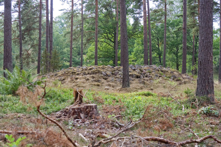 Gravröse på gravfältet Vassrödjorna. Motiv: Adelöv 12:2 - Vassrödjorna Kategori: Röse, Gravfält Gravröse på gravfältet Vassrödjorna.